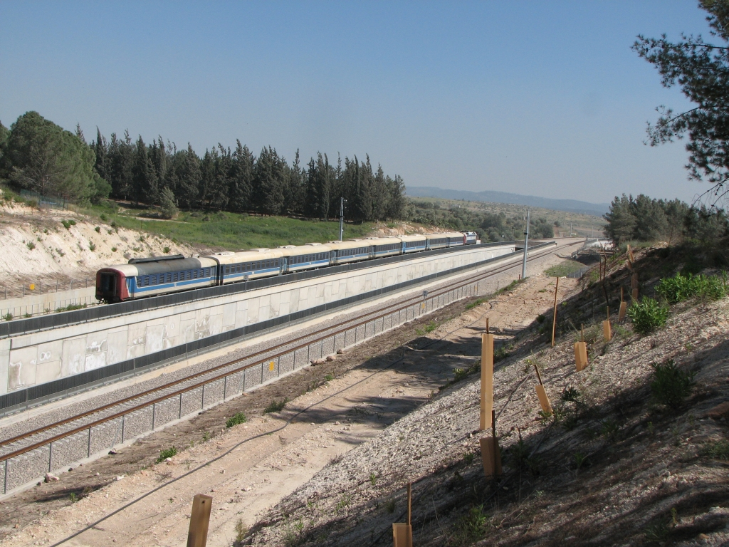 קרונות גרורי קטר מתוצרת בוריס קידריץ ואסלינגן